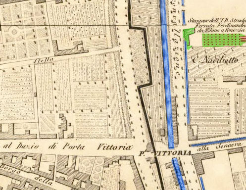 Sezione della mappa di Milano dell'editore Antonio Vallardi (1860): evidenziata in verde l'area occupata dalla demolita stazione di Porta Tosa, Milano